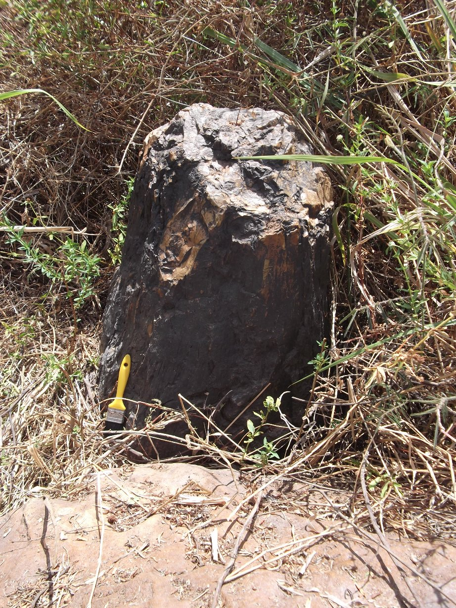 Tronco de gimnosperma em posição de vida, Floresta Fóssil do Rio Poti, em Teresina.